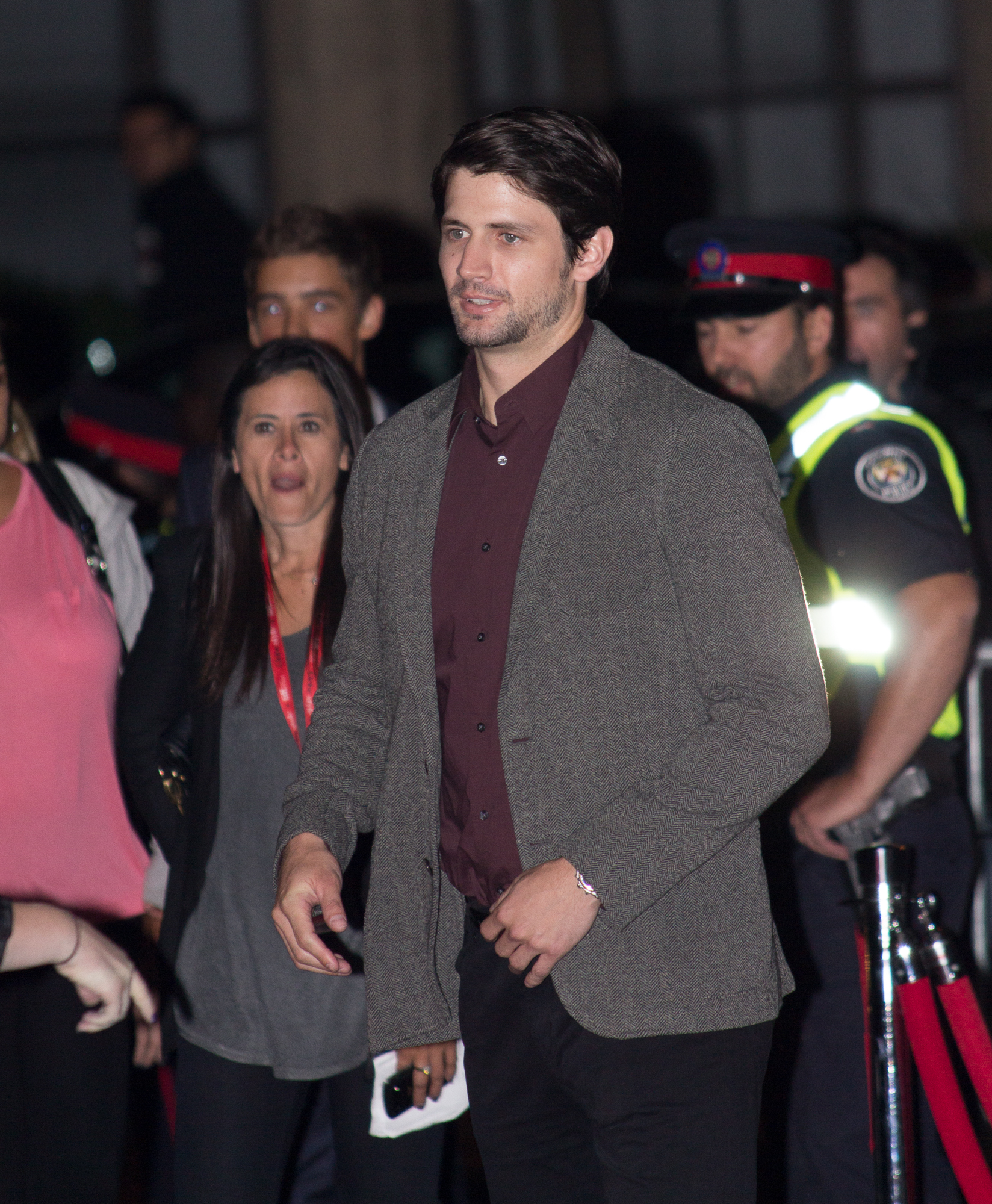 _MG_7179.jpg